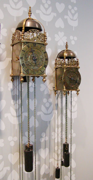 Twee Engelse lantaarnklokken in het Nederlands Goud-, Zilver- en Klokkenmuseum in Schoonhoven. Zelfgemaakte media, vrijgegeven onder GFDL